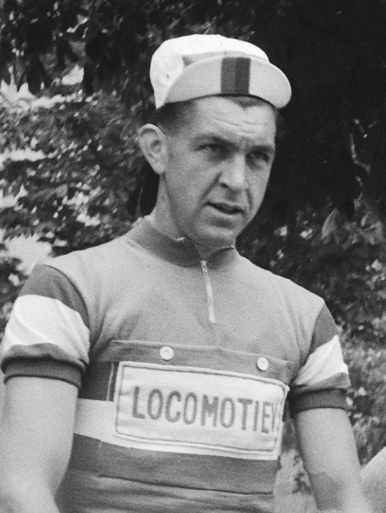 Nationaal Archief Beschrijving: De Nederlandse ploeg, Tour de France 1960 Martin van de Borgh Datum: 28 juni 1960 Bestanddeelnummer 911-3748 Vervaardiger: Anefo / Harry Pot (1929–1996) DescriptionDutch photographer and cinematographerDate of birth/death 1929 1996Work location Amsterdam, BentveldAuthority control : Q27877051 VIAF: 284191334 ISNI: 0000 0003 9050 874X Koninklijke: 073478326 creator QS:P170,Q27877051 URL: Voor meer informatie over het Nationaal Archief: Voor meer foto's uit deze en andere collecties, bezoek onze Beeldbank:, U kunt ons helpen onze kennis van de fotocollecties te verrijken door tags en commentaren toe te voegen. Herkent u mensen of locaties of heeft u een bijzonder verhaal te vertellen bij één van de foto's, laat dan een reactie achter (als u ingelogd bent bij Flickr) of stuur een mailtje naar